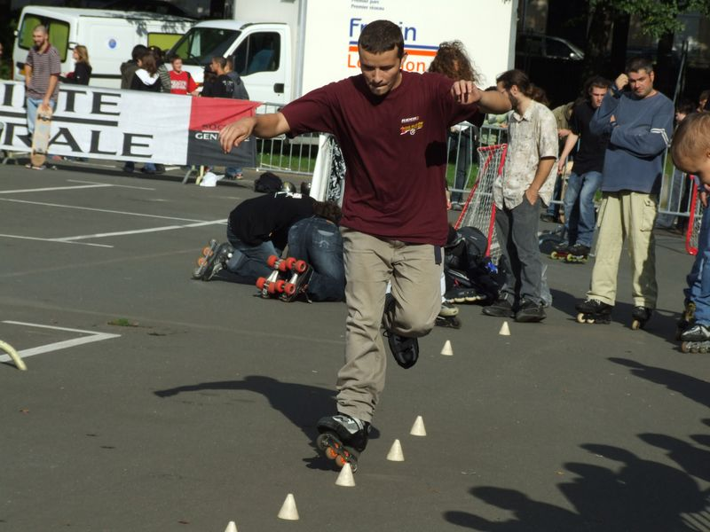 Slalom (figure: Wheeling, rider: TigrRoue) au Mans